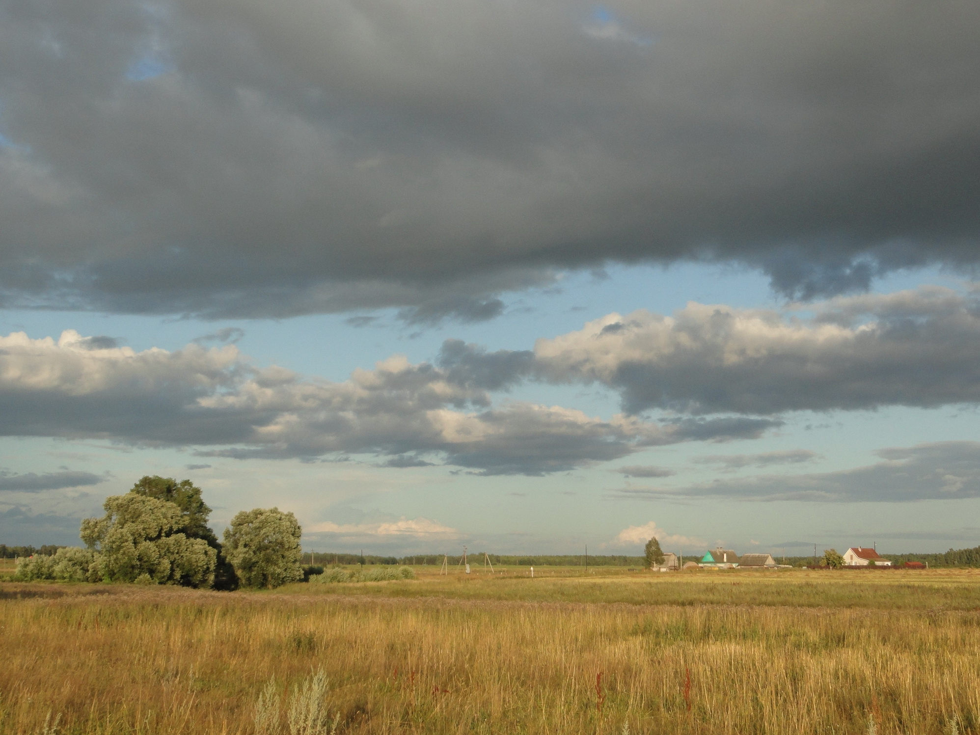 Малые Токари, Бобруйский район